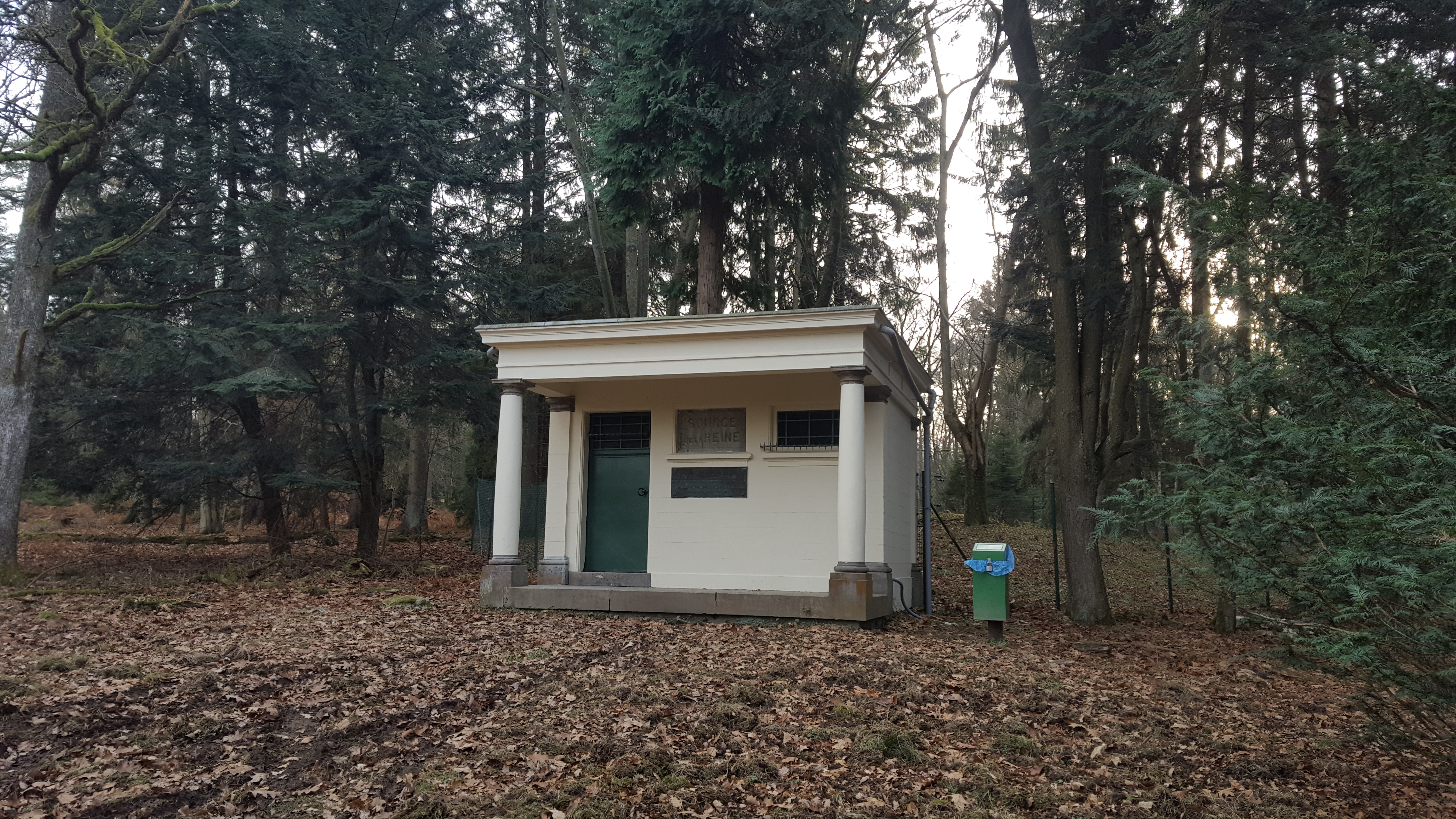 Source de la Reine, Spa, Belgique